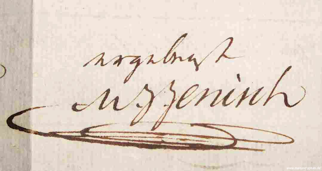 Eigenhändige Unterschrift von Martin Johann Jenisch dem Älteren auf einem Geschäftsbrief vom 8. November 1802